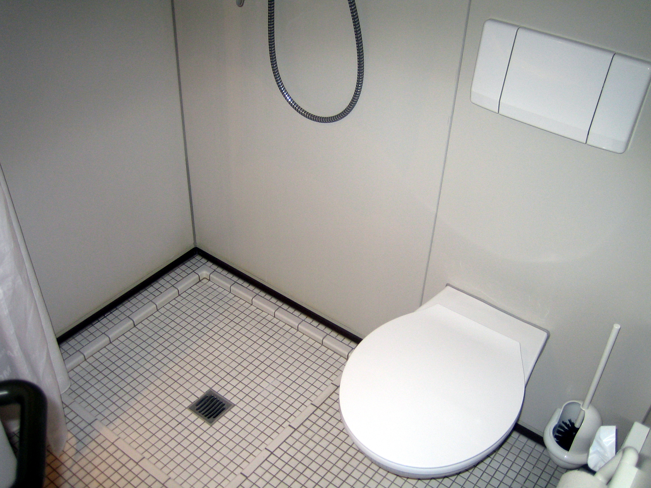 Académie Européenne d'Otzenhausen - Intérieur (coin douche et WC) de la salle de bains d'une chambre du bâtiment principal.